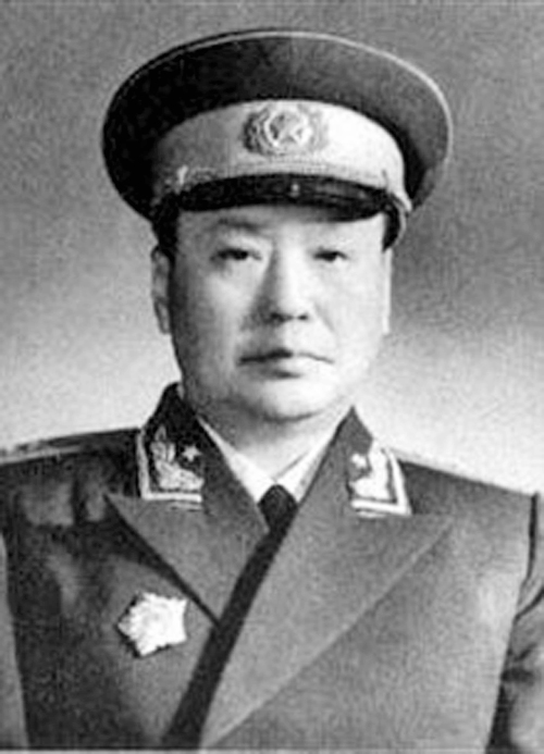 1955 乌兰夫上将授勋图